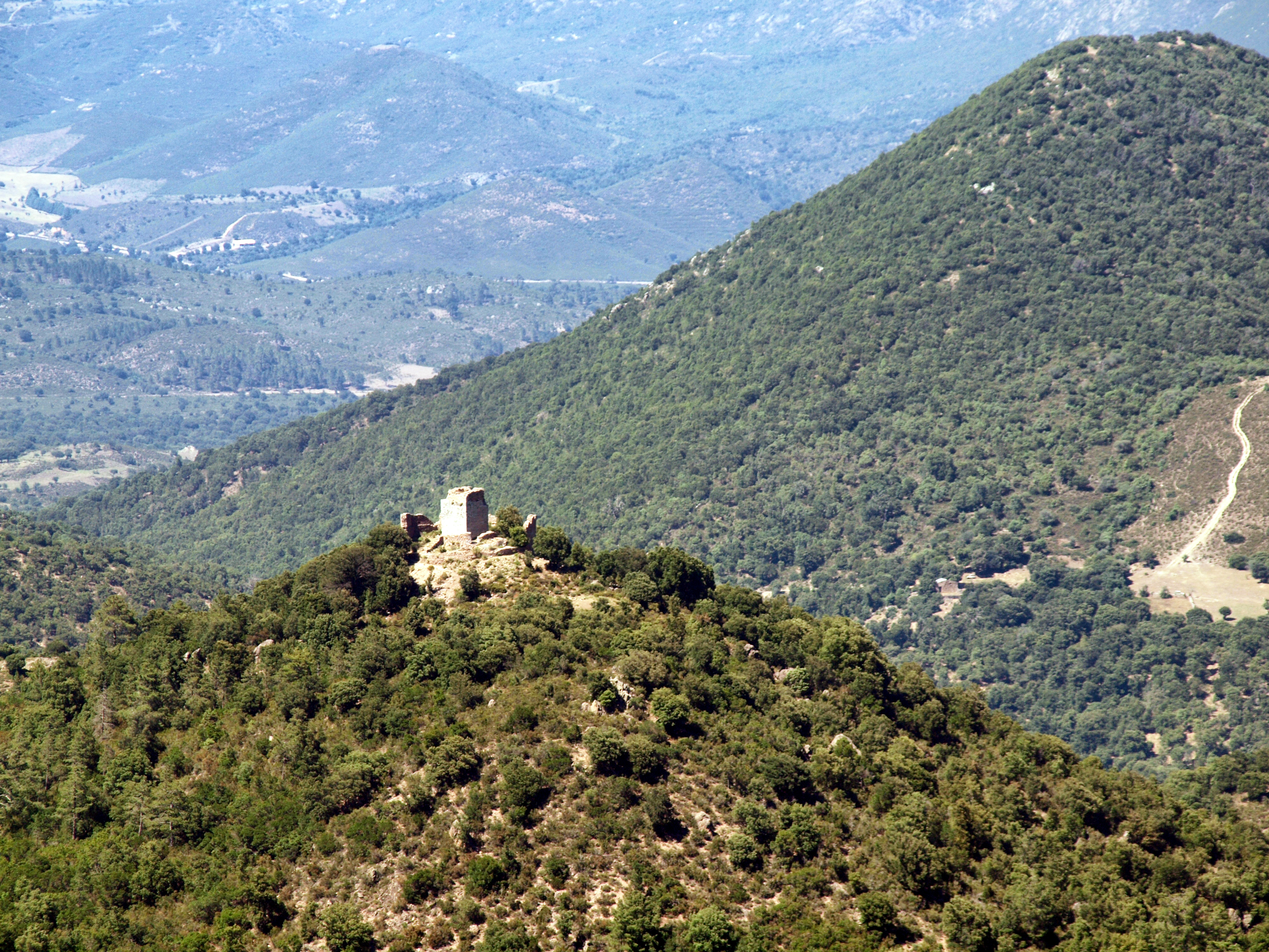 Prato-di-Giovellina, Ghjuvellina (Corse) - Castello di Serravalle